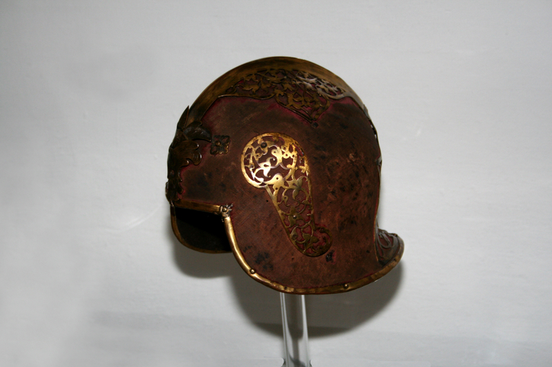 Celata alla veneziana da pompa, XVI sec., Palazzo Duranti-Marzoli, Palazzolo sull'Oglio.